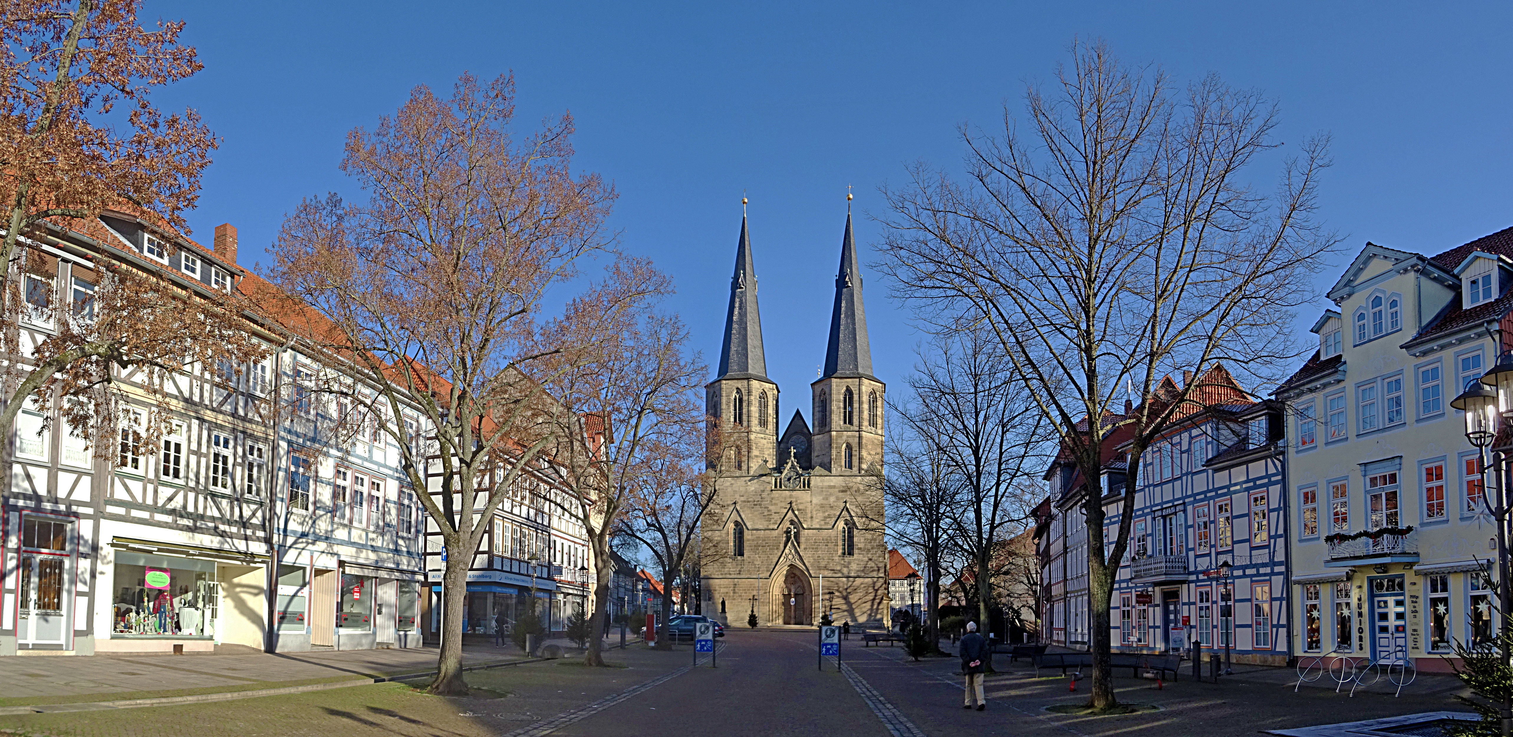 Marktstraße mit Propsteikirche St. Cyriakus (auch Oberkirche) in Duderstadt